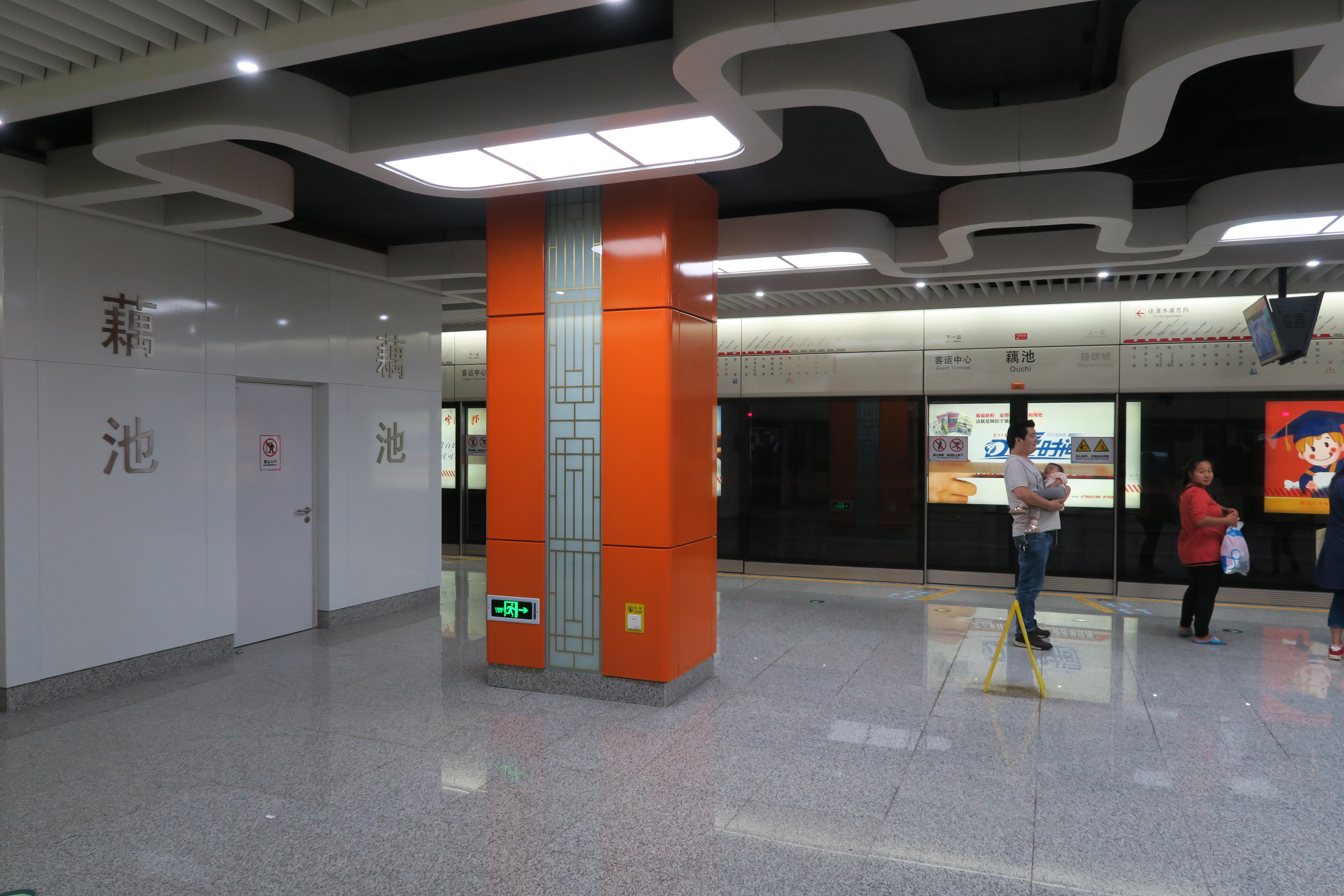 宁波轨道交通藕池站站台